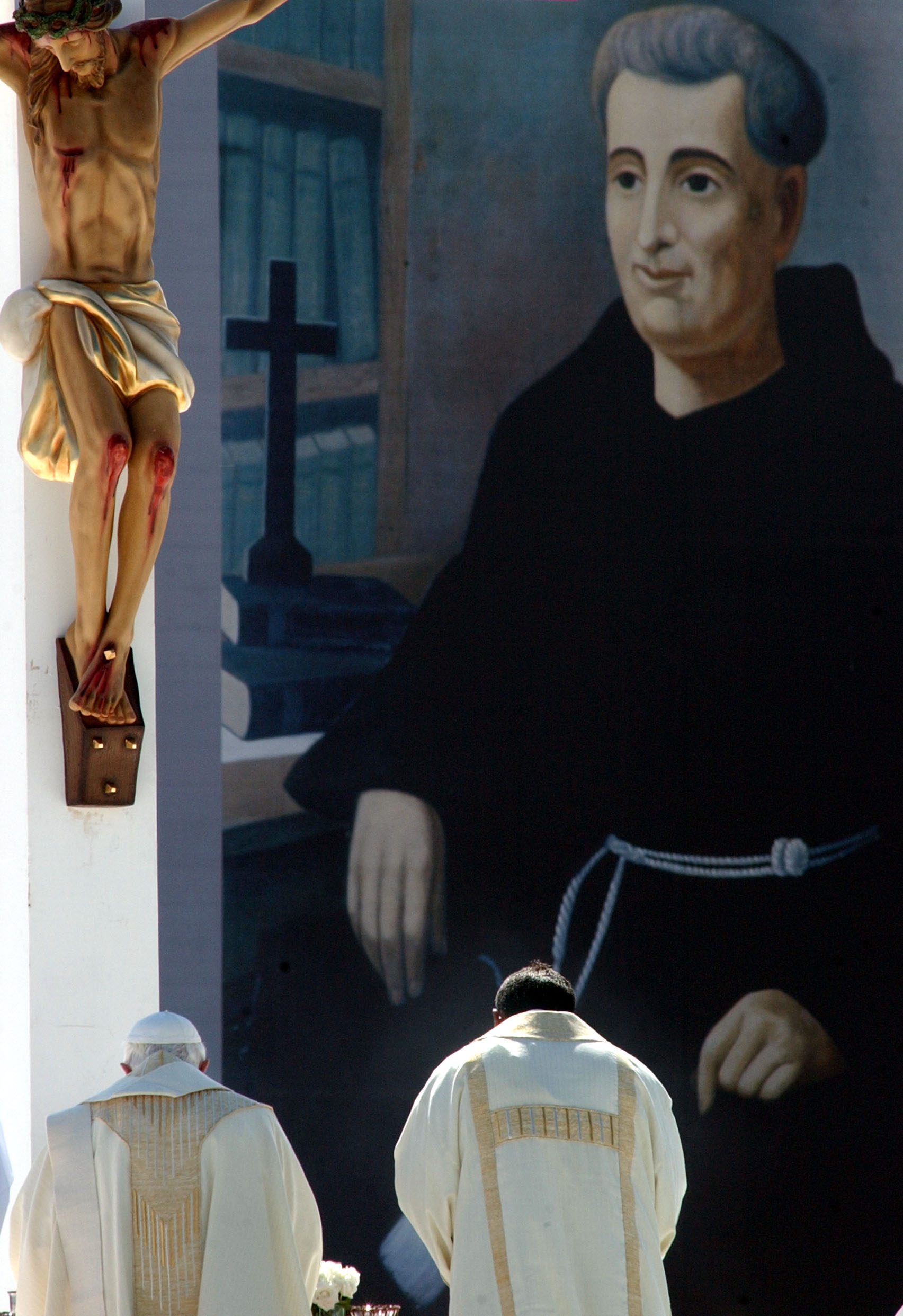 Cerimônia de canonização do frade brasileiro Frei Galvão celebrada pelo papa Bento XVI no Campo de Marte em São Paulo, Brasil.